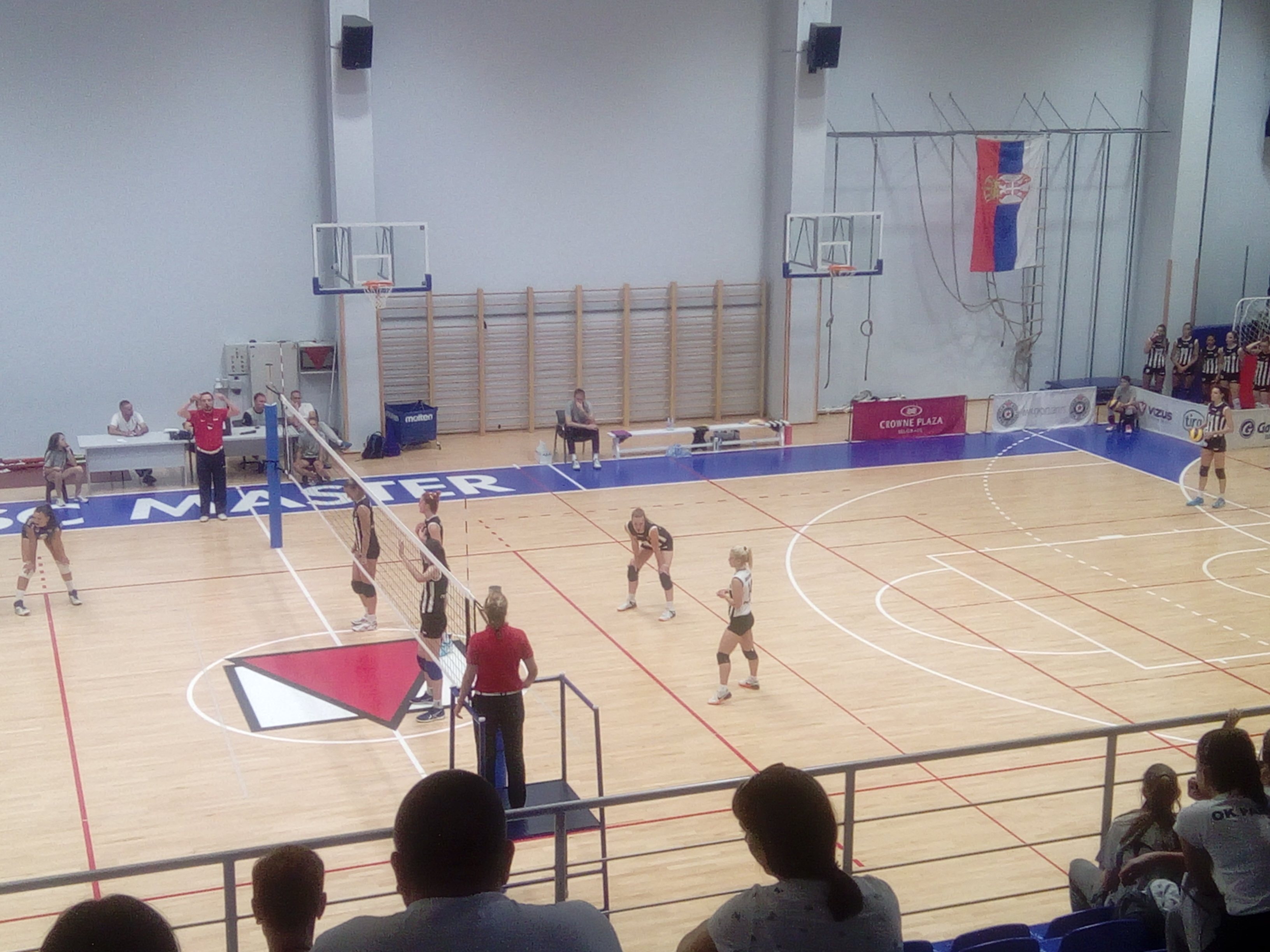 Srpski (latinica): Kup Srbije: ŽOK Partizan - ŽOK Zaslon Šabac